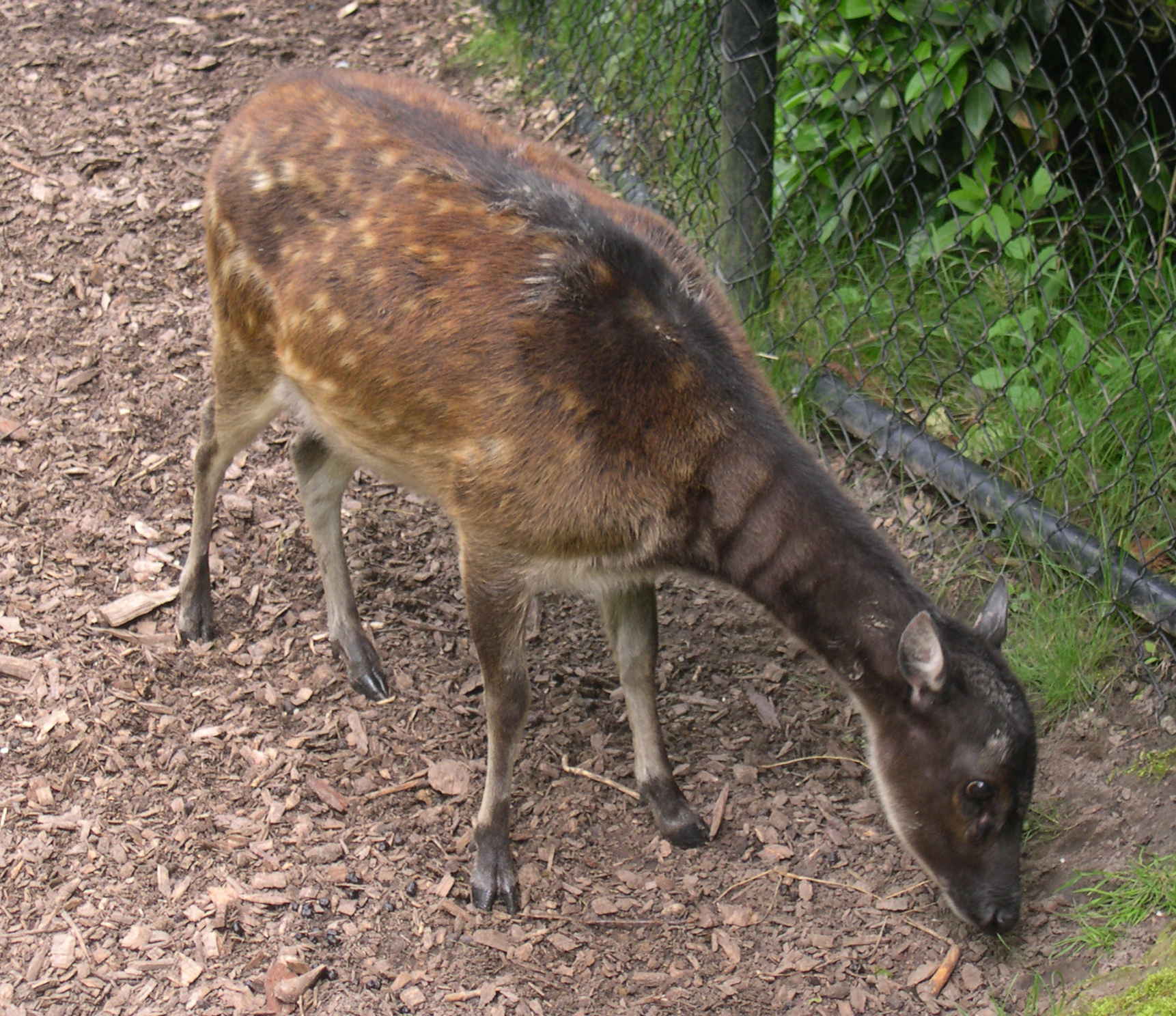 Cervus alfredi (Deer species) in Diergaarde Blijdorp, Rotterdam